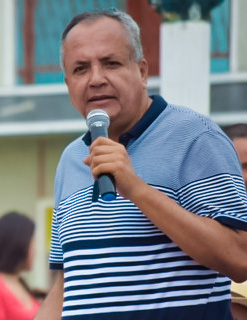 Óscar Barreto Quiroga